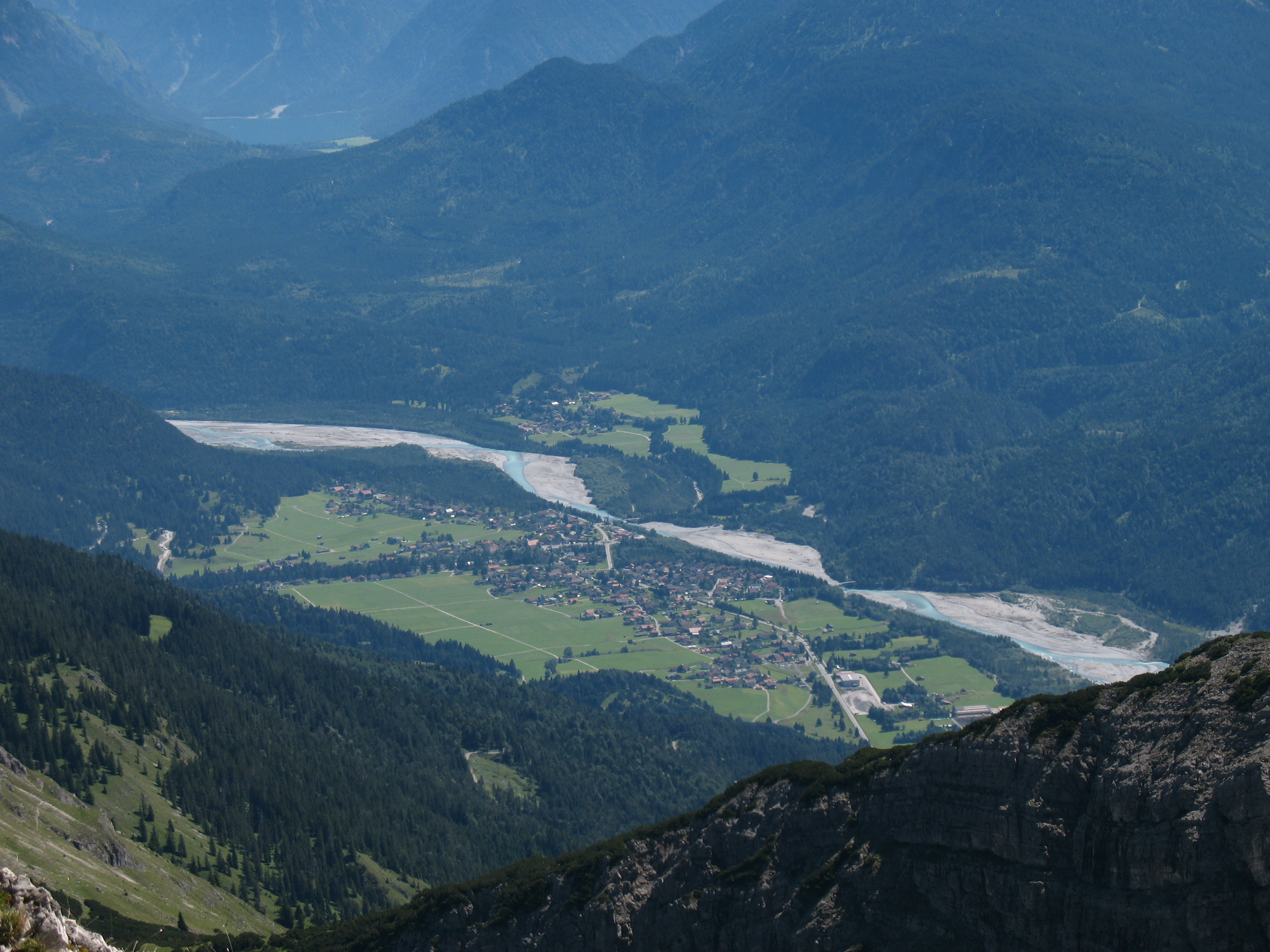 Blick von der Leilachspitze auf Weißenbach am Lech.